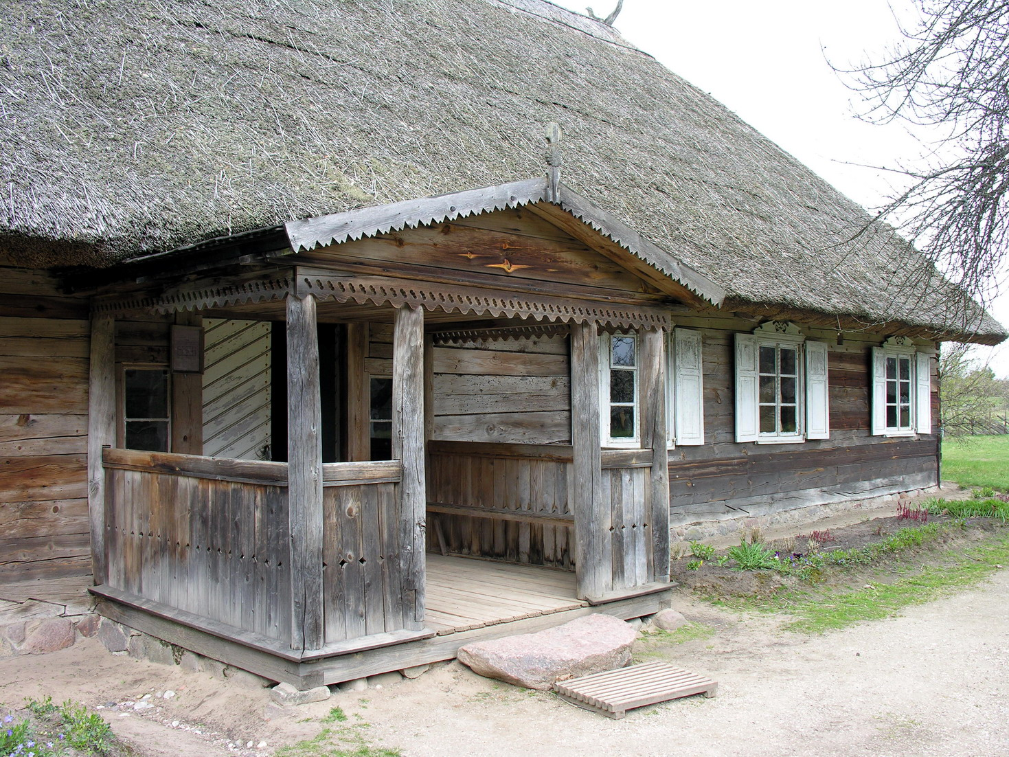 Gonkos